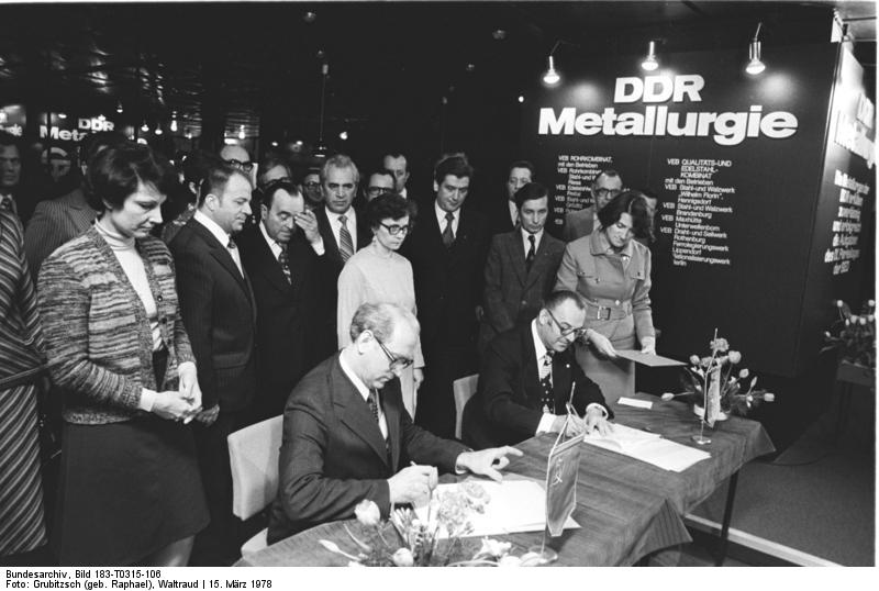 ADN-ZB/Raphael/15.3.1978 Leipzig: Frühjahrsmesse 78 Bedeutende Verträge über den Import schwarzmetallurgischer Erzeugnisse aus der UdSSR wurden am 15.3. vom Generaldirektor des VE Metallurgiehandel der DDR, Georg Süptitz (vorn, r.), und vom Präsidenten des sowjetischen Außenhandelunternehmens Promsyrioimport, Gleb S. Afanasejew (vorn, l.) unterzeichnet. Einer der Abschlüsse sieht die Lieferung von 500.000 Tonnen Roheisen vor.